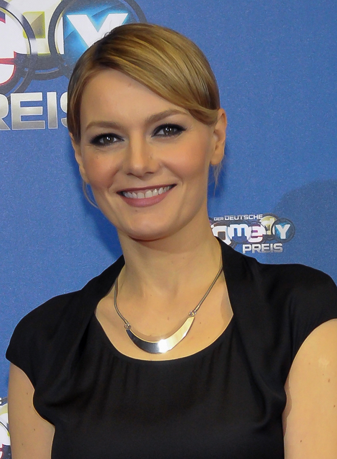 Martina Hill auf dem Deutschen Comedypreis in Köln am 15. Oktober 2013.